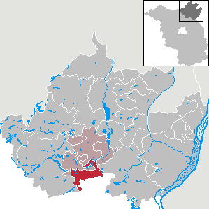 Temmen-Ringenwalde in Brandenburg (Country) - District Uckermark